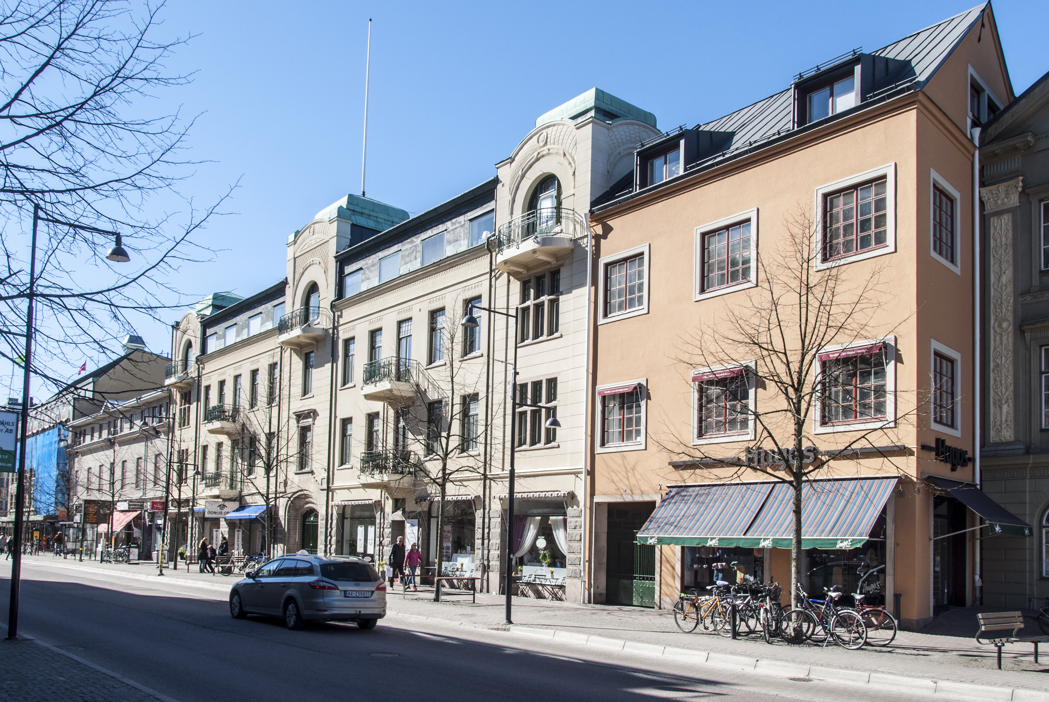 kv. Björnen, Karlstad utmed Järnvägsgatan f.v. Björnen 5. Byggår 1930, Arkitekt Cyrillus Johansson Björnen 5, Byggår 1907, Arkitekt Carl Crispin